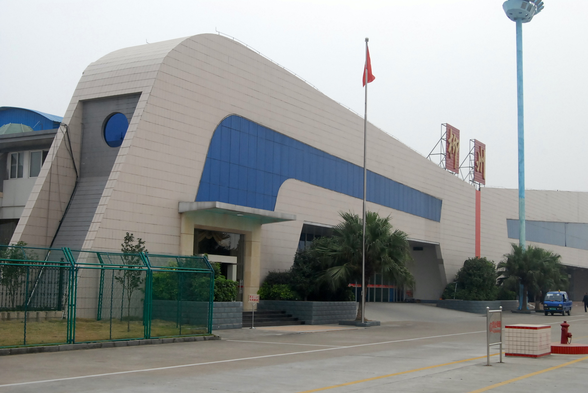 柳州机场